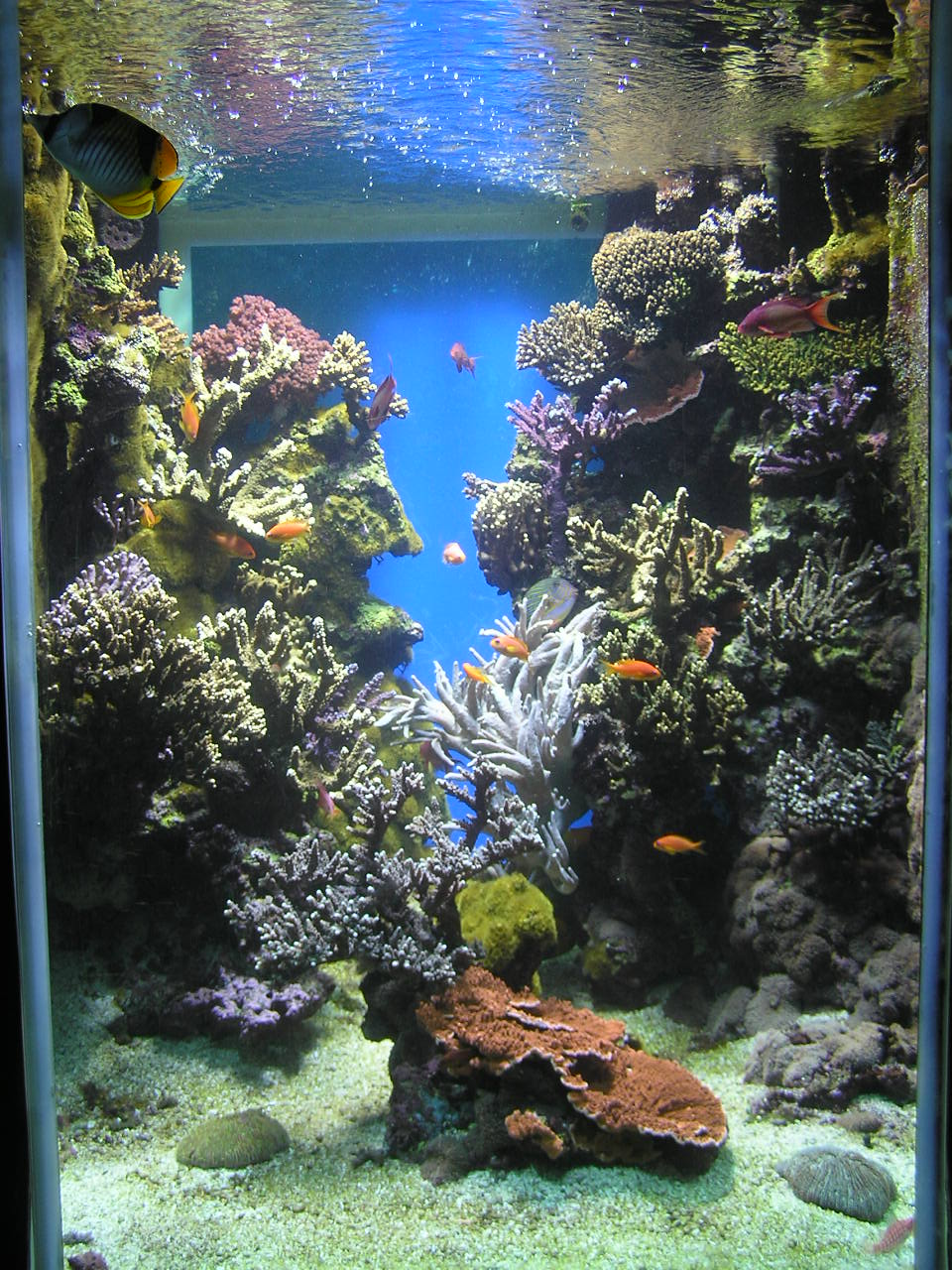 Un acuario marino. This picture was taken by me (Filip Maljkovic) on June 26th, 2004 at 18:12, when I was on a trip to Monaco.